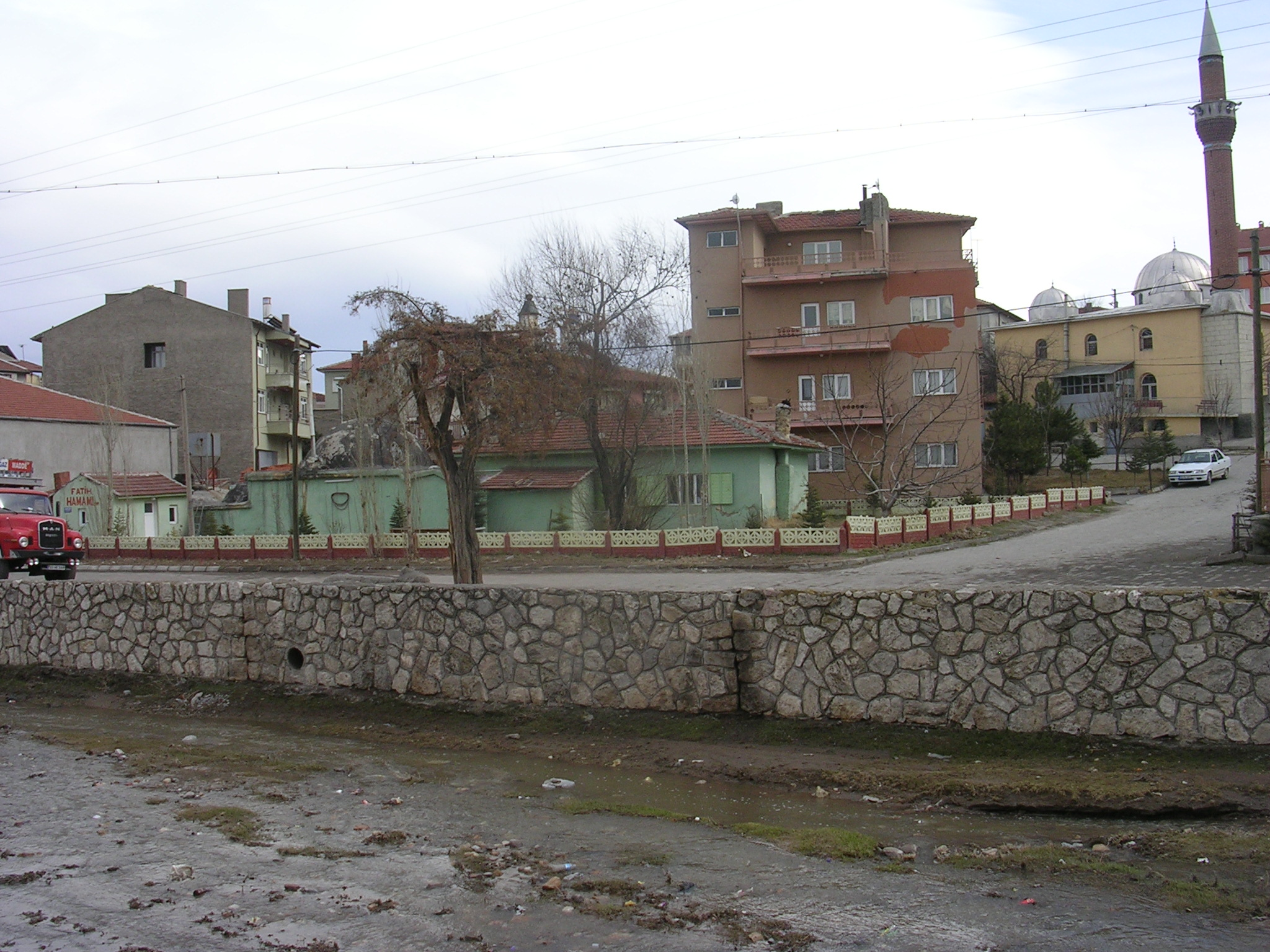 eski hamam ve çaydere, old hamam and çaydere, emirdag, afyon turkey